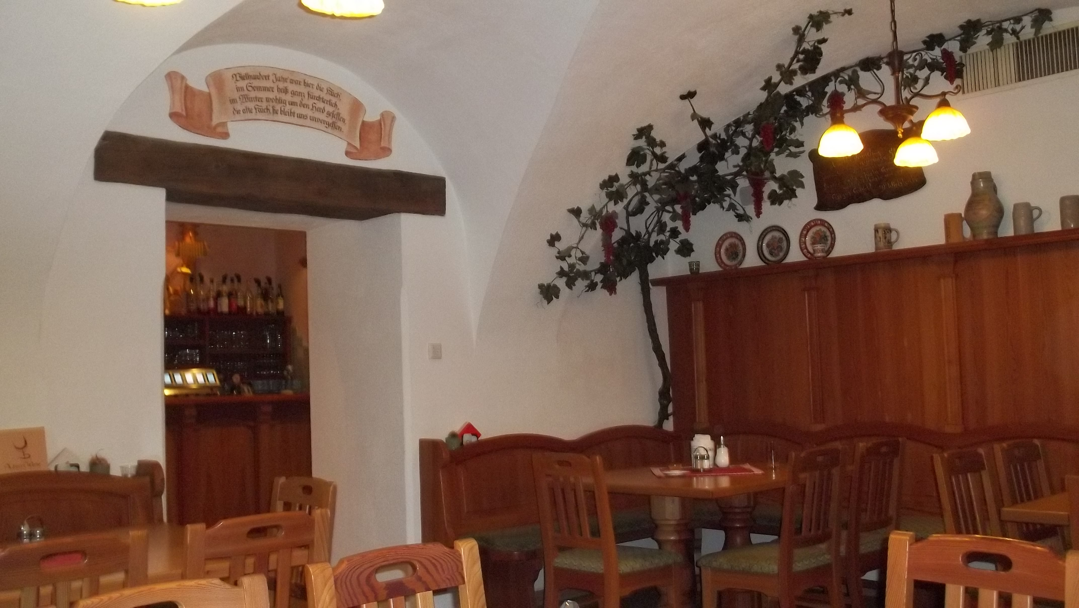 Gaststube des Gasthofes "Zum Schweizer", Lofer